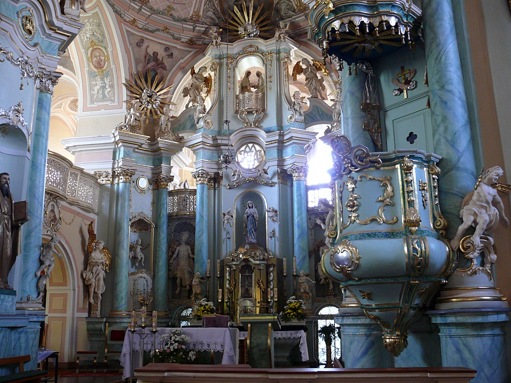 Ołtarz główny w kościele bernardyńskim w Kole